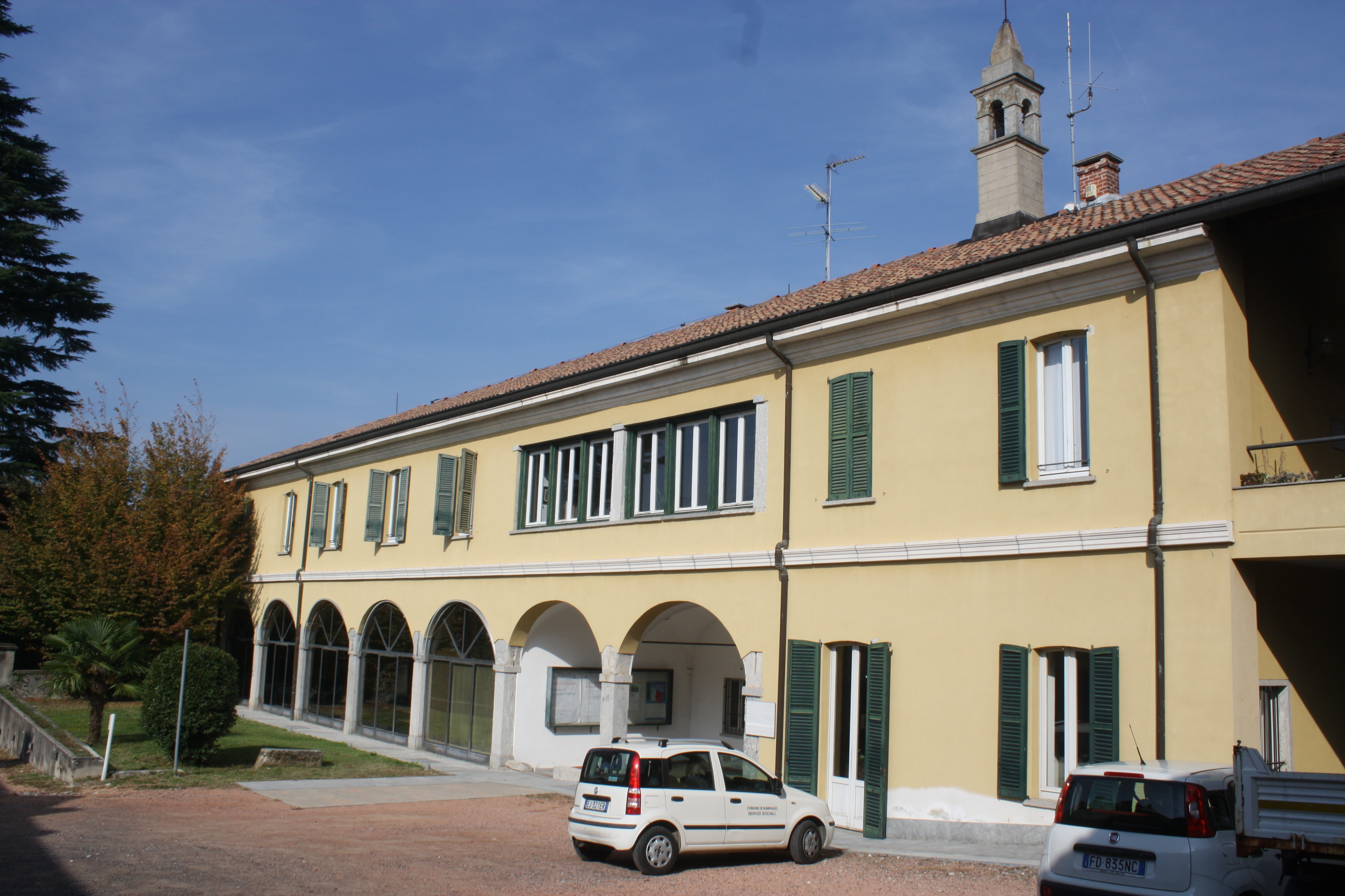 Villa Molino, sede del comune di Sumirago.